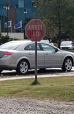 Vandalisme sur un panneau bilingue ARRÊT-STOP au Québec. L'altération vise à remplacer le mot STOP par une référence à 101, la loi québécoise sur la langue française.